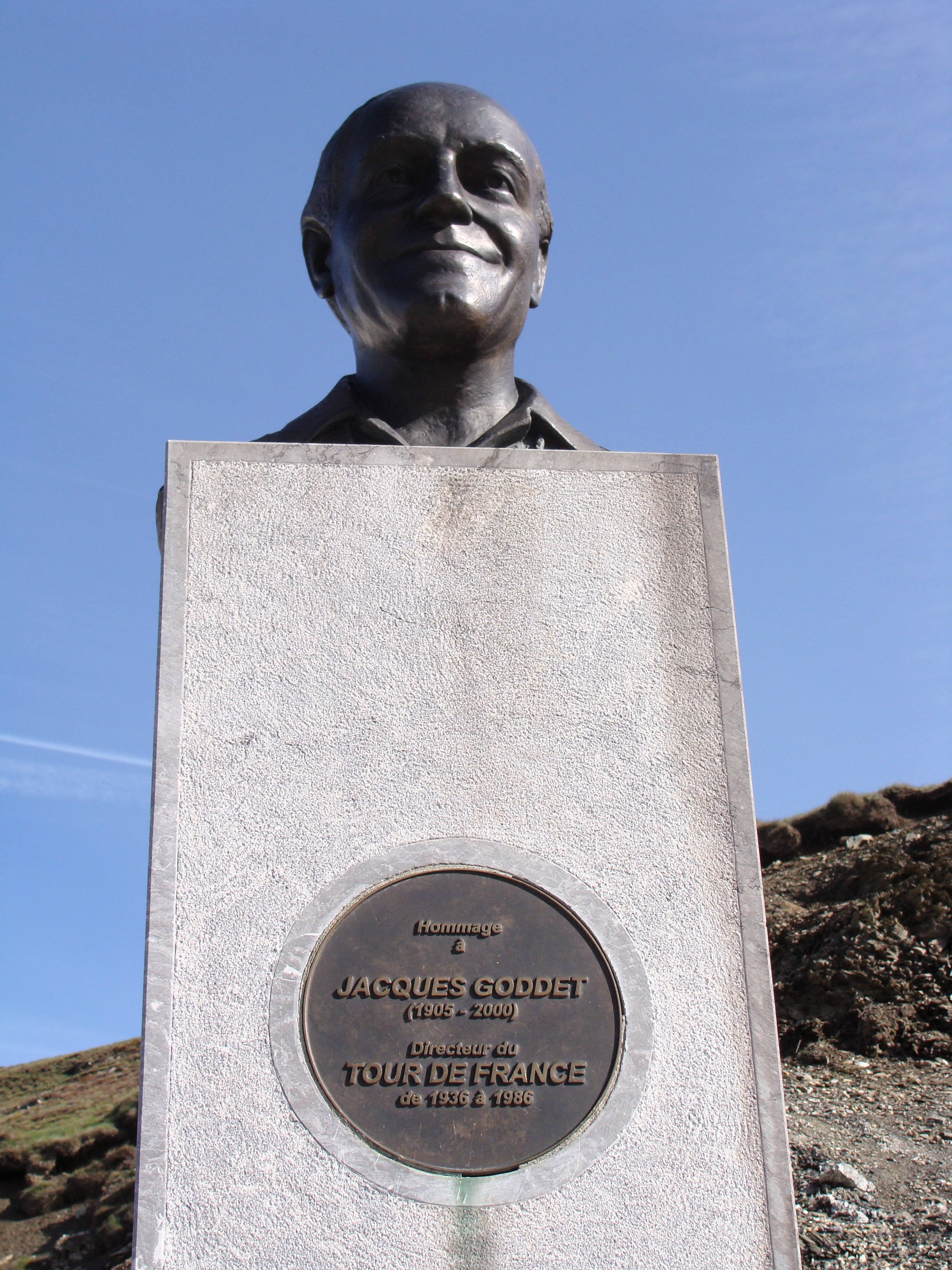 Col du Tourmalet stèle en hommage à Jacques Godet Directeur du Tour de france